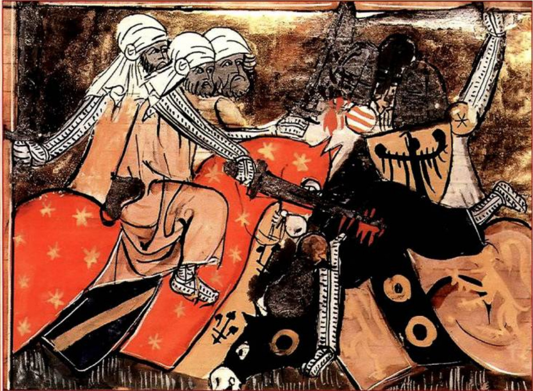 Bataille entre croisés et chevaliers arabes. France XIVème siècle